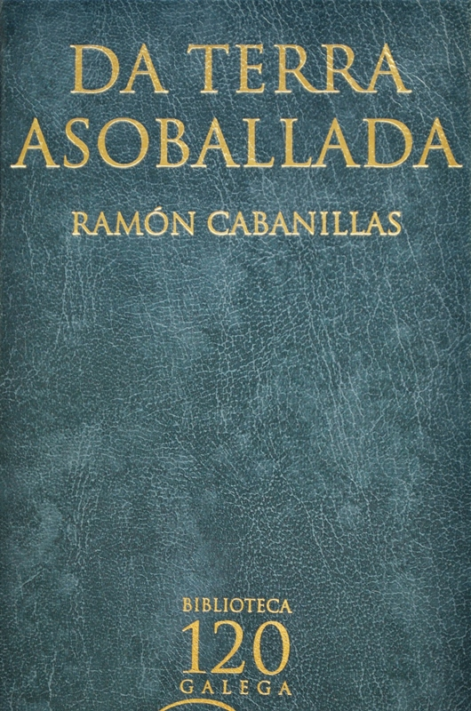 Detalle da portada dun volume de Da terra asoballada de Ramón Cabanillas, da Biblioteca Galega 120.